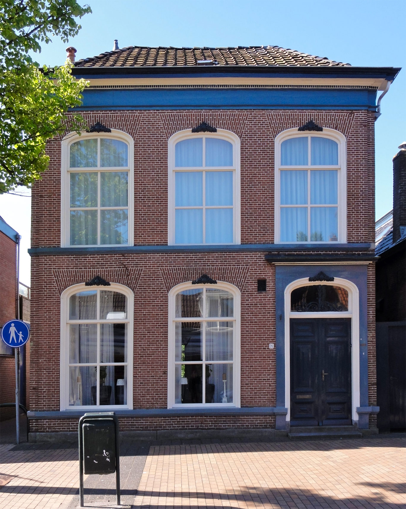 Van_Harenstraat 26 in Sint-Annaparochie